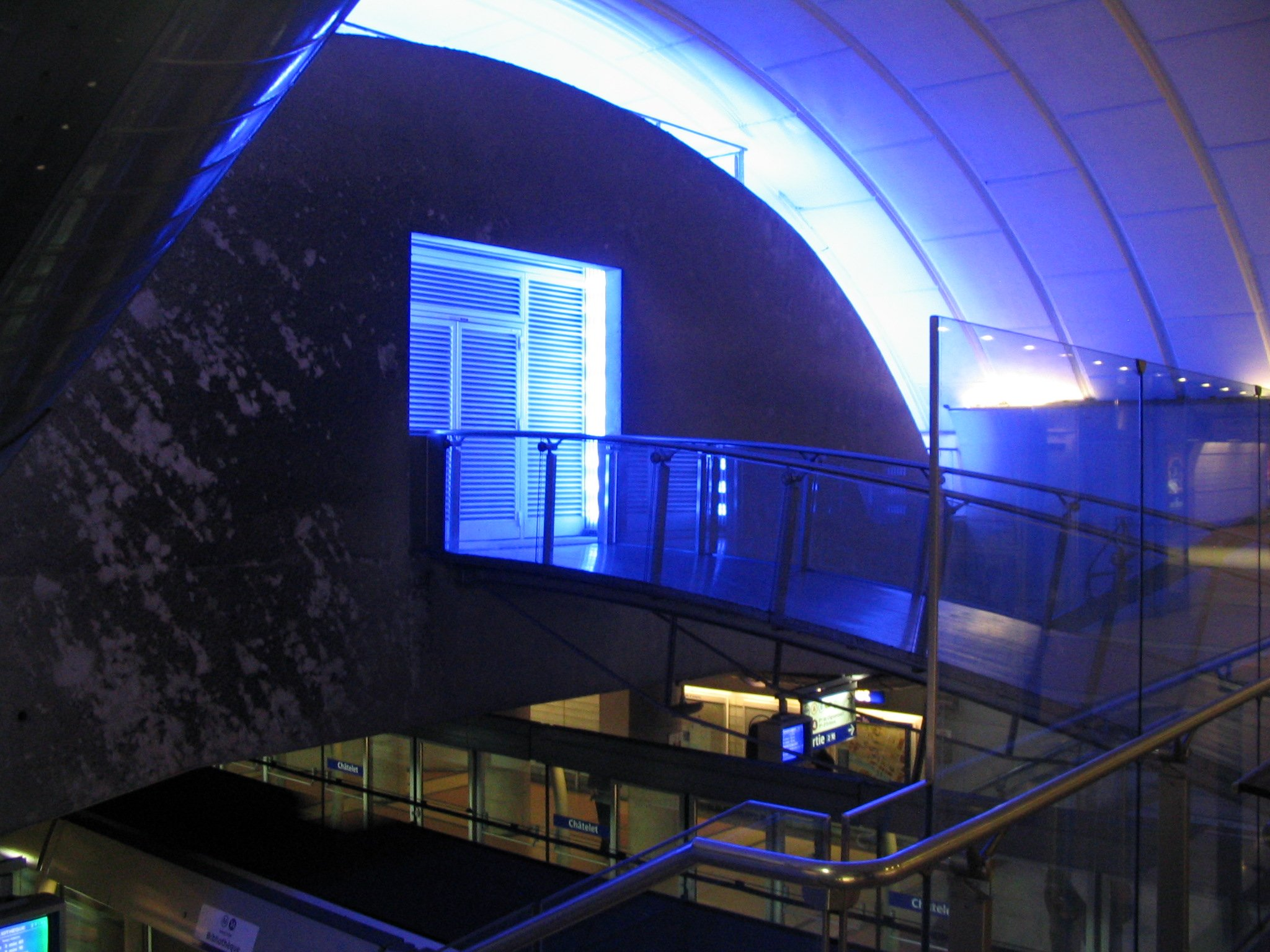 Porte éclairée en bleu au dessus de la ligne 14 à la station Châtelet